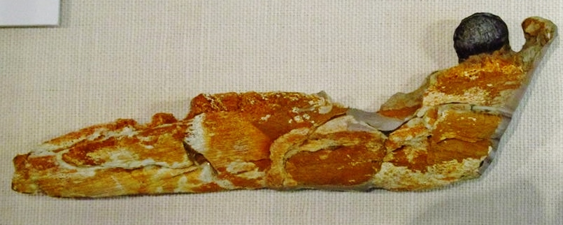 Fossil of Tholodus, an extinct reptile - Muschelkalkmuseum Hagdorn